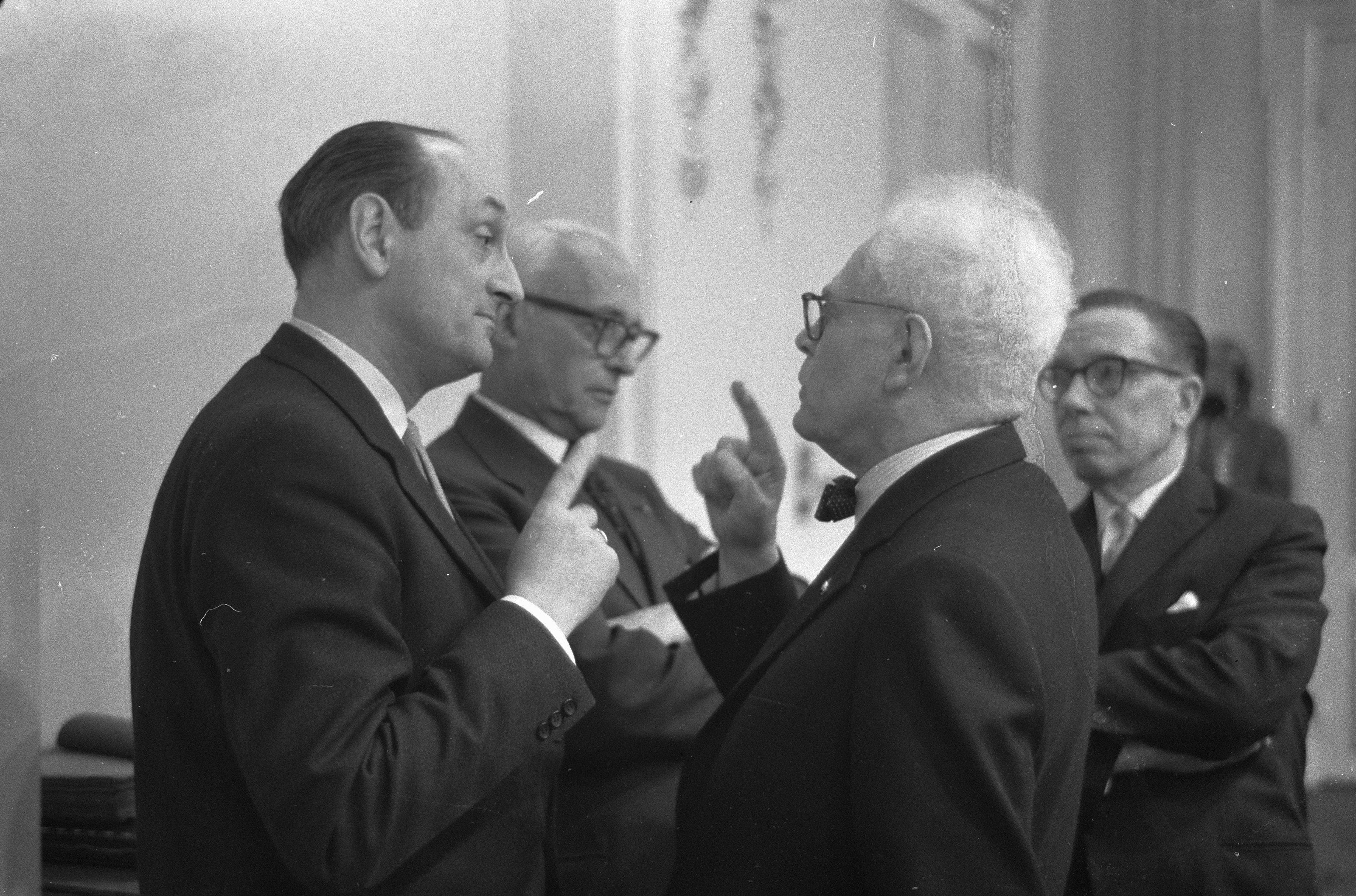 Collectie / Archief : Fotocollectie Anefo Reportage / Serie : [ onbekend ] Beschrijving : Nieuw Guinea debat in de Tweede Kamer , Minister Toxopeus en prof. Oud bespreken kwestie Nieuw Guinea Datum : 29 maart 1960 Locatie : Nieuw-Guinea Persoonsnaam : Oud, P.J., Toxopeus, Edzo Fotograaf : Pot, Harry / Anefo Auteursrechthebbende : Nationaal Archief Materiaalsoort : Negatief (zwart/wit) Nummer archiefinventaris : bekijk toegang 2.24.01.05 Bestanddeelnummer : 911-1312